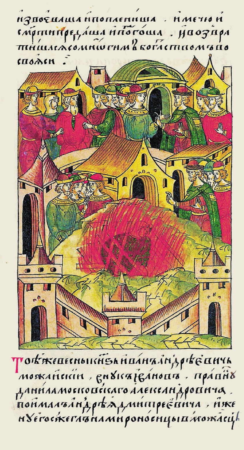 В ту же весну князь Иван Андреевич Мо- жайский, внук Иванов, правнук Даниила Александровича Мо- сковского, взял в плен Андрея Дмитриевича и сжег его жену в Мо- жайске в неделю Жен мироносиц.